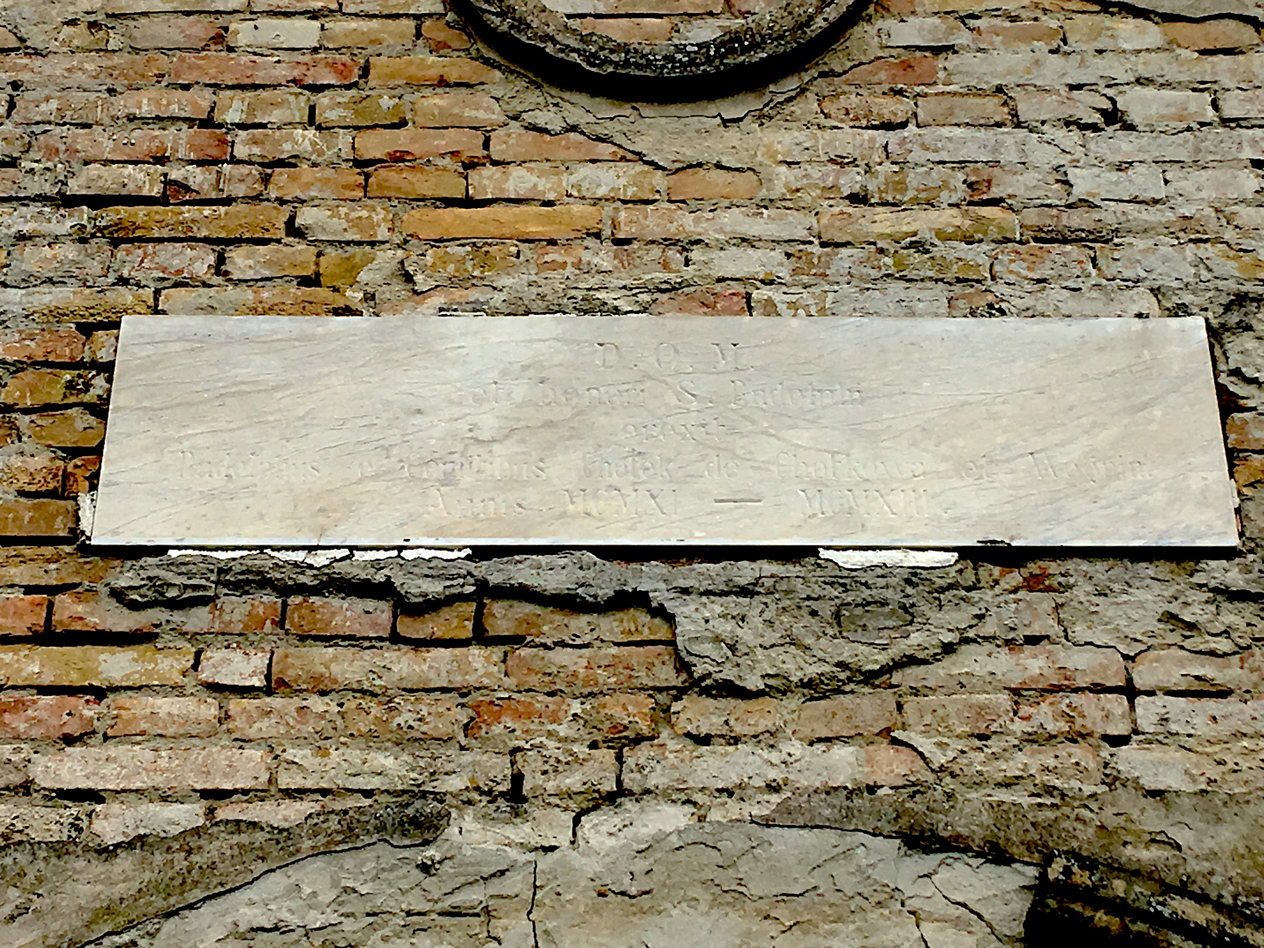 Pamětní deska zmiňující zakladatele kostela hraběte Rudolfa Chotka, umístěna nad vstupním portálem